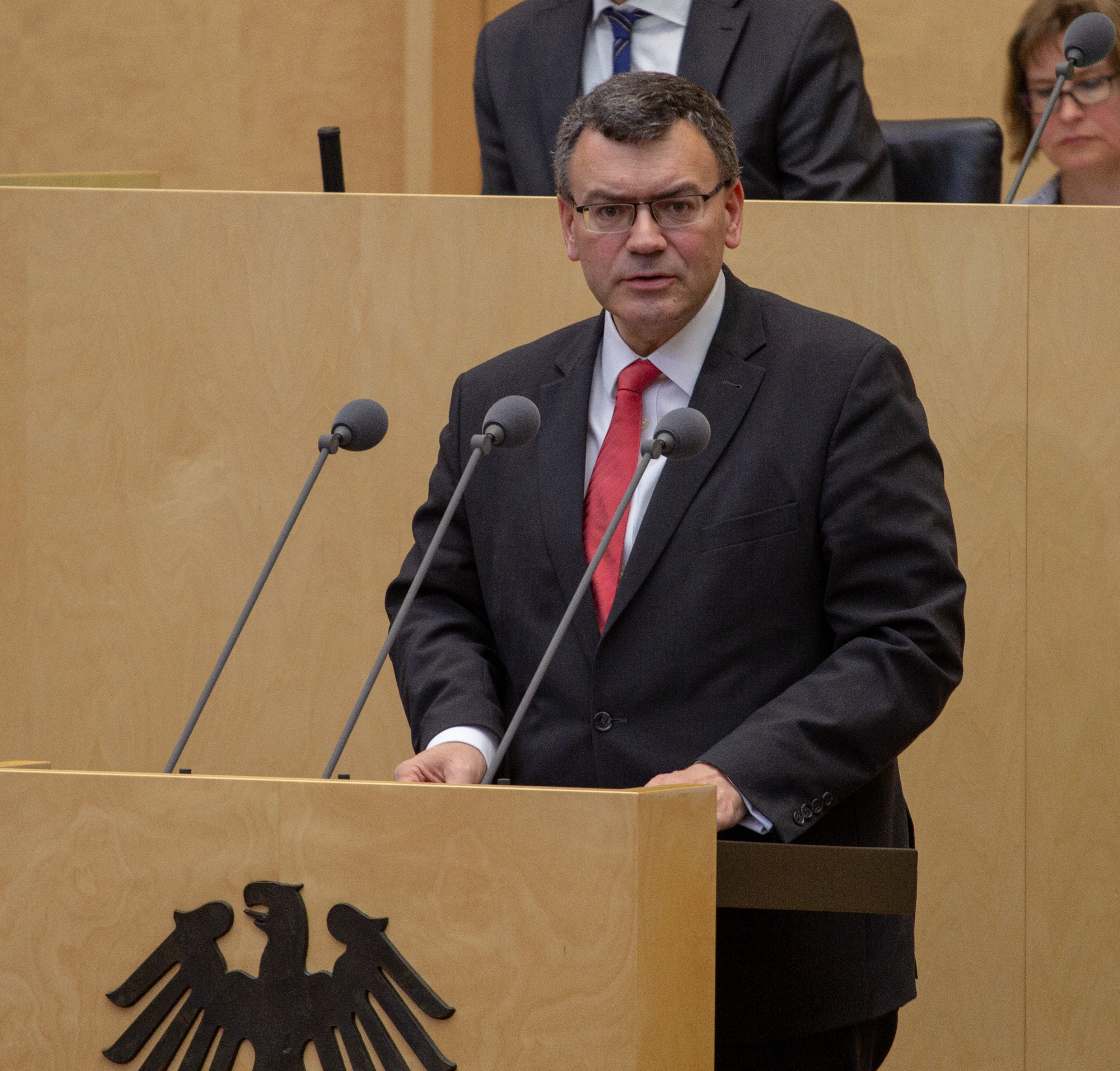 Plenarsitzung des Bundesrates am 12. April 2019 in Berlin.